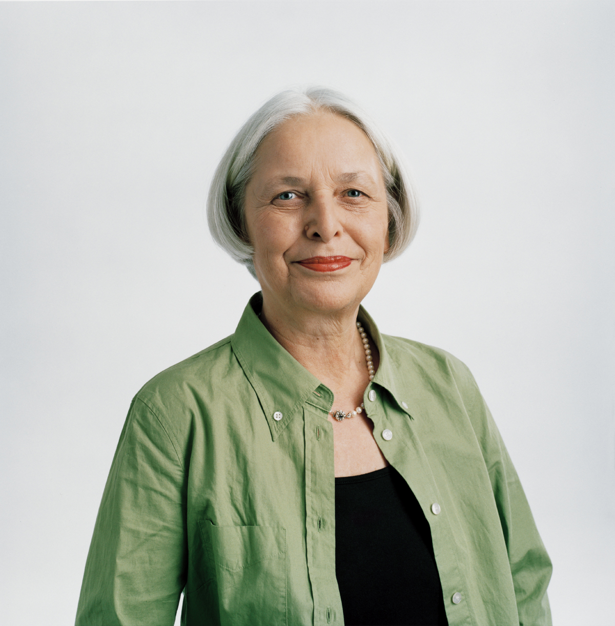 Heidi Cammerlander. Wiener Landtagsabgeordnete und Mitglied des Wiener Gemeinderats (Die Grünen)